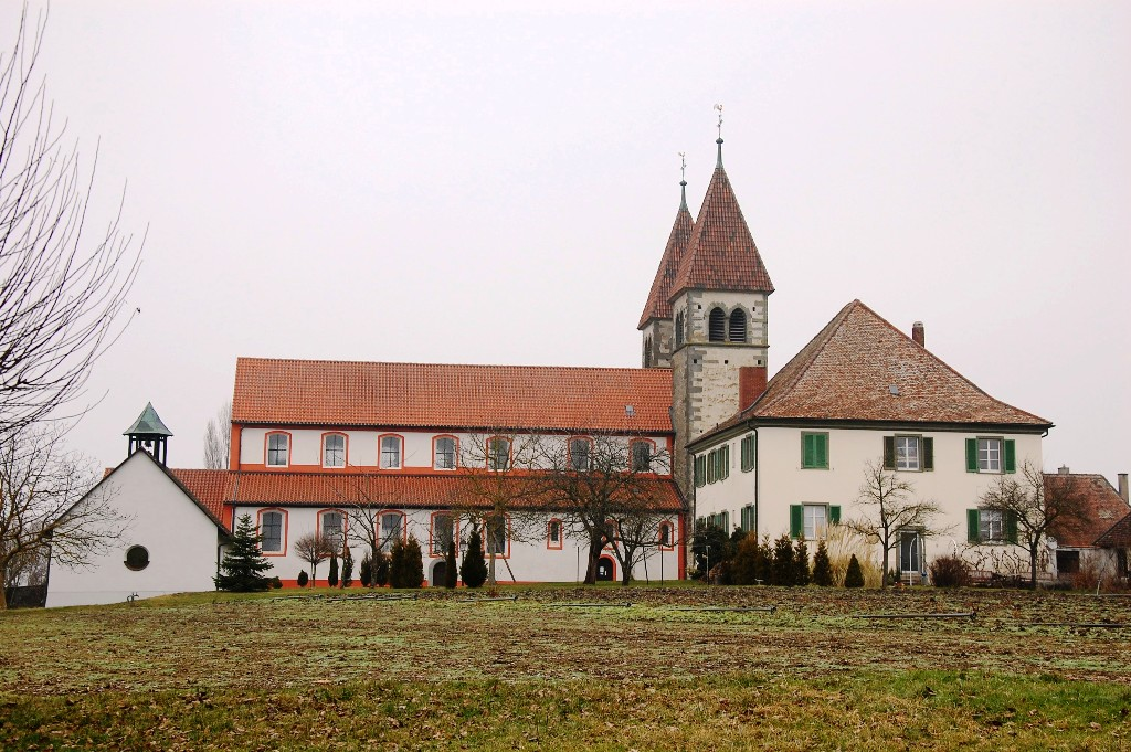 Kirche St. Peter und Paul